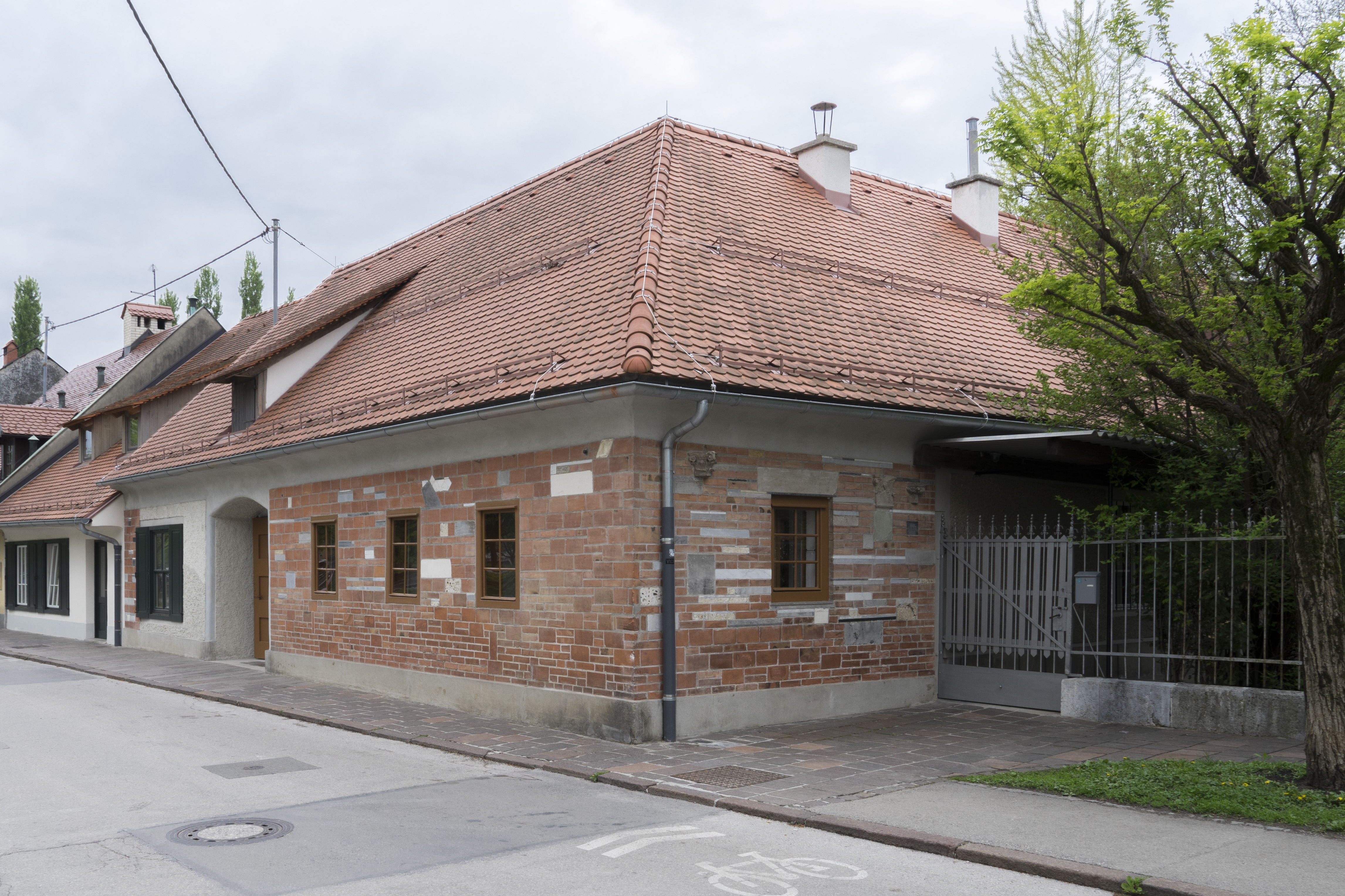 Plečniks Wohnhaus mit Wintergarten